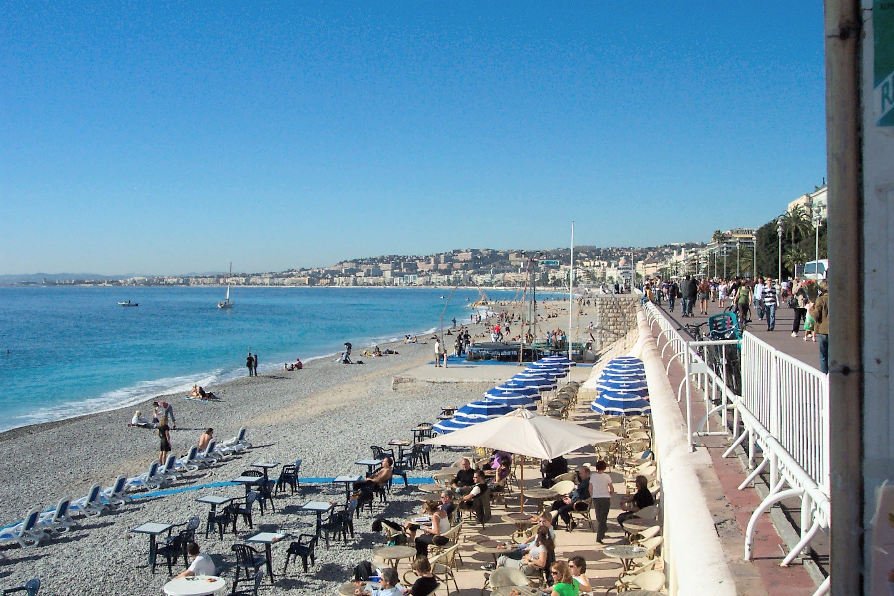 Nice. Opera plage en automne.